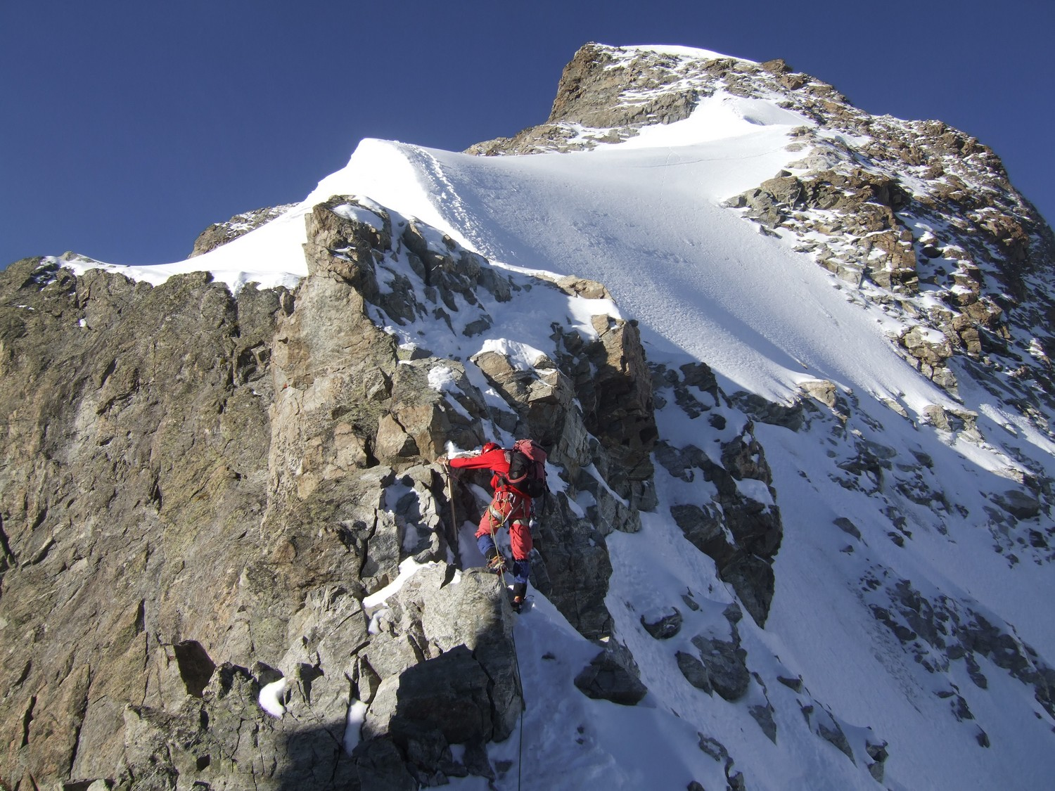 Meije - Pic Oriental - Arête NE